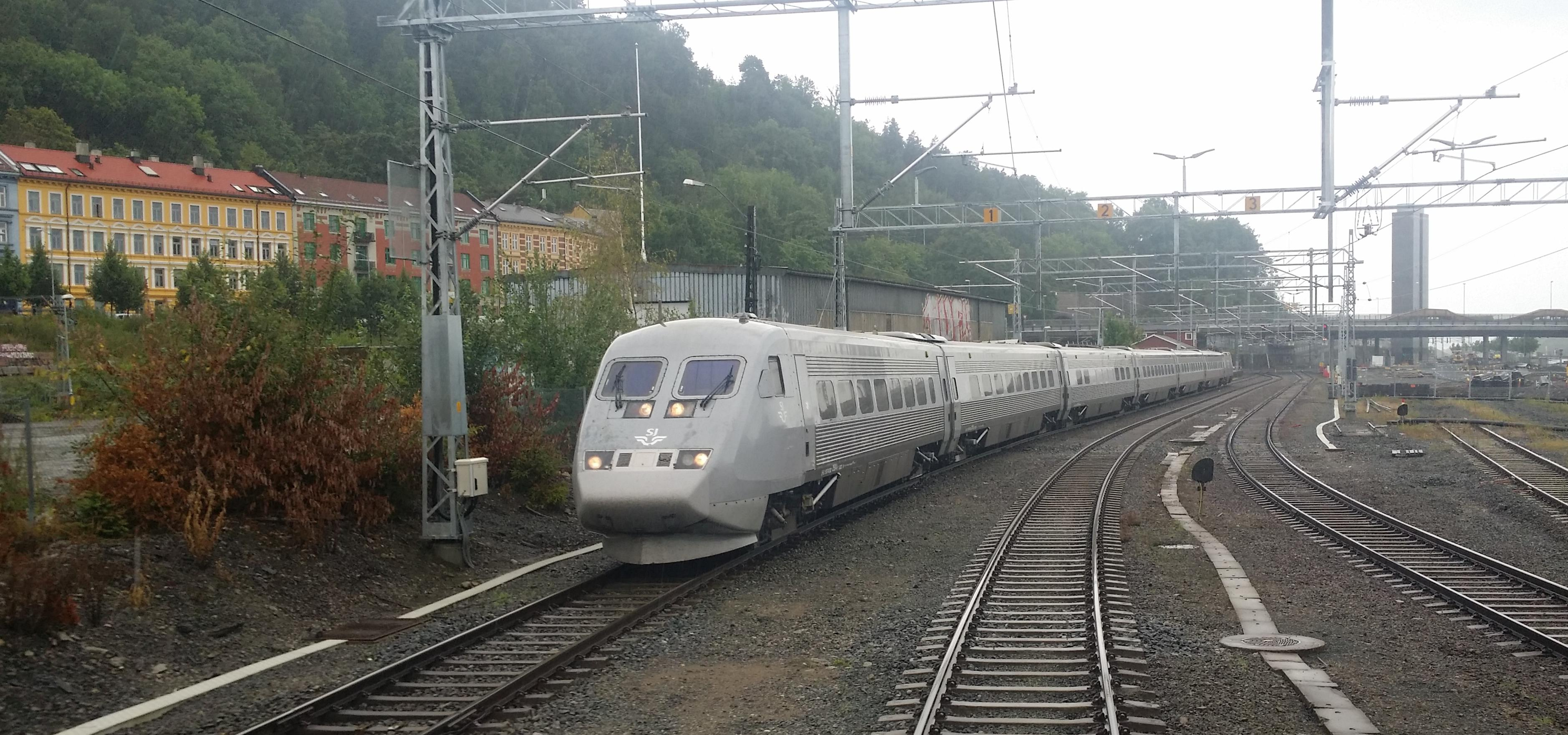 Loenga 6. august 2016